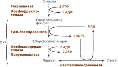 Участки гликолиза, связанные с образованием и затратой энергии